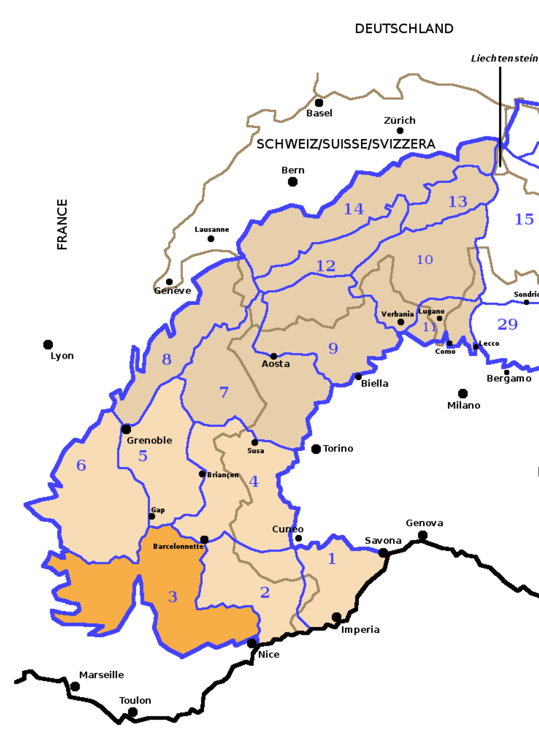 Alpi Occidentali secondo la SOIUSA con evidenziate le Alpi e Prealpi di Provenza